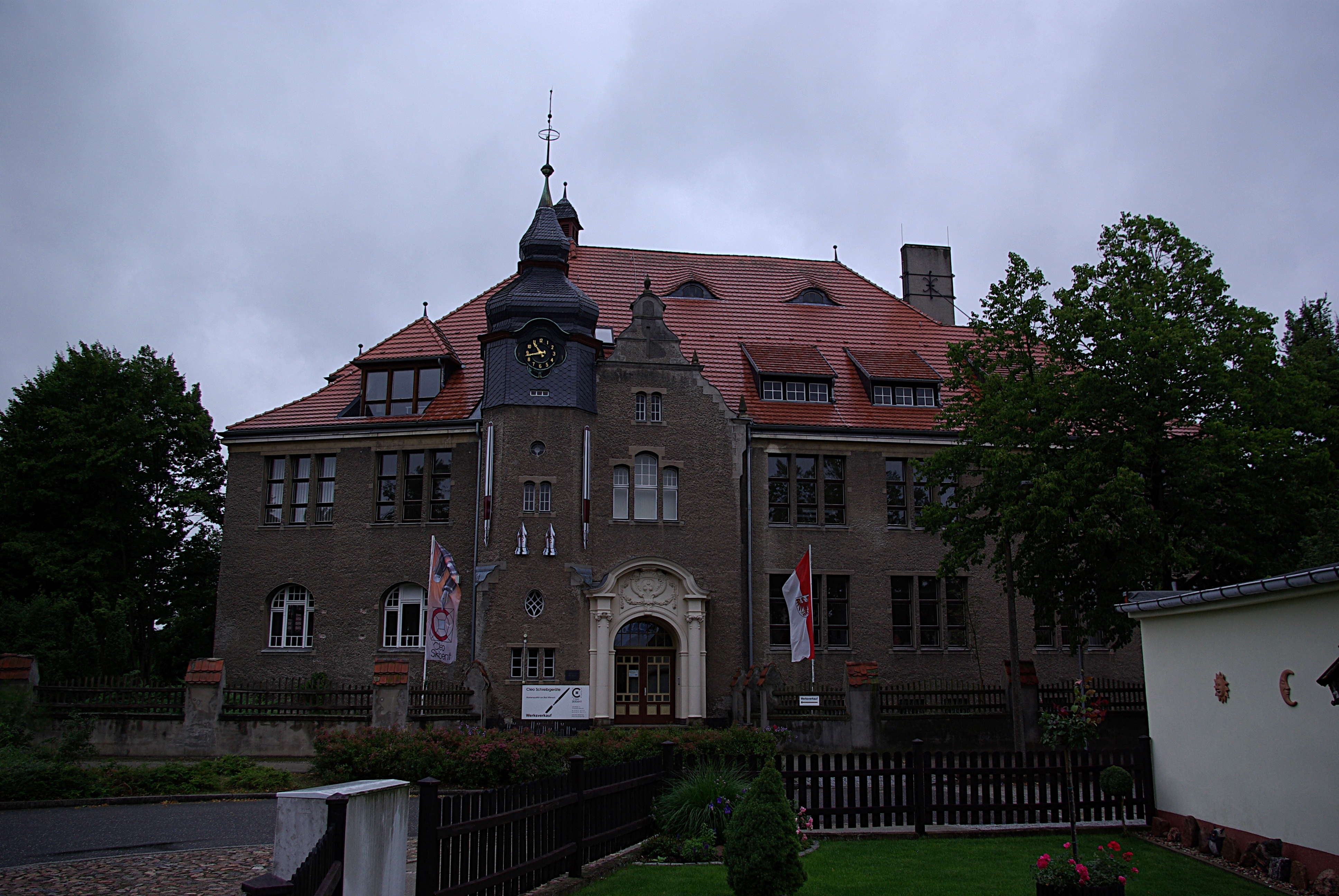 Bad Wilsnack in Brandenburg. In der alten Schule in Bad Wilsnack befindet sich heute die Fa. cleo, ein Hersteller von Füllhaltern gehobener Preisklasse.